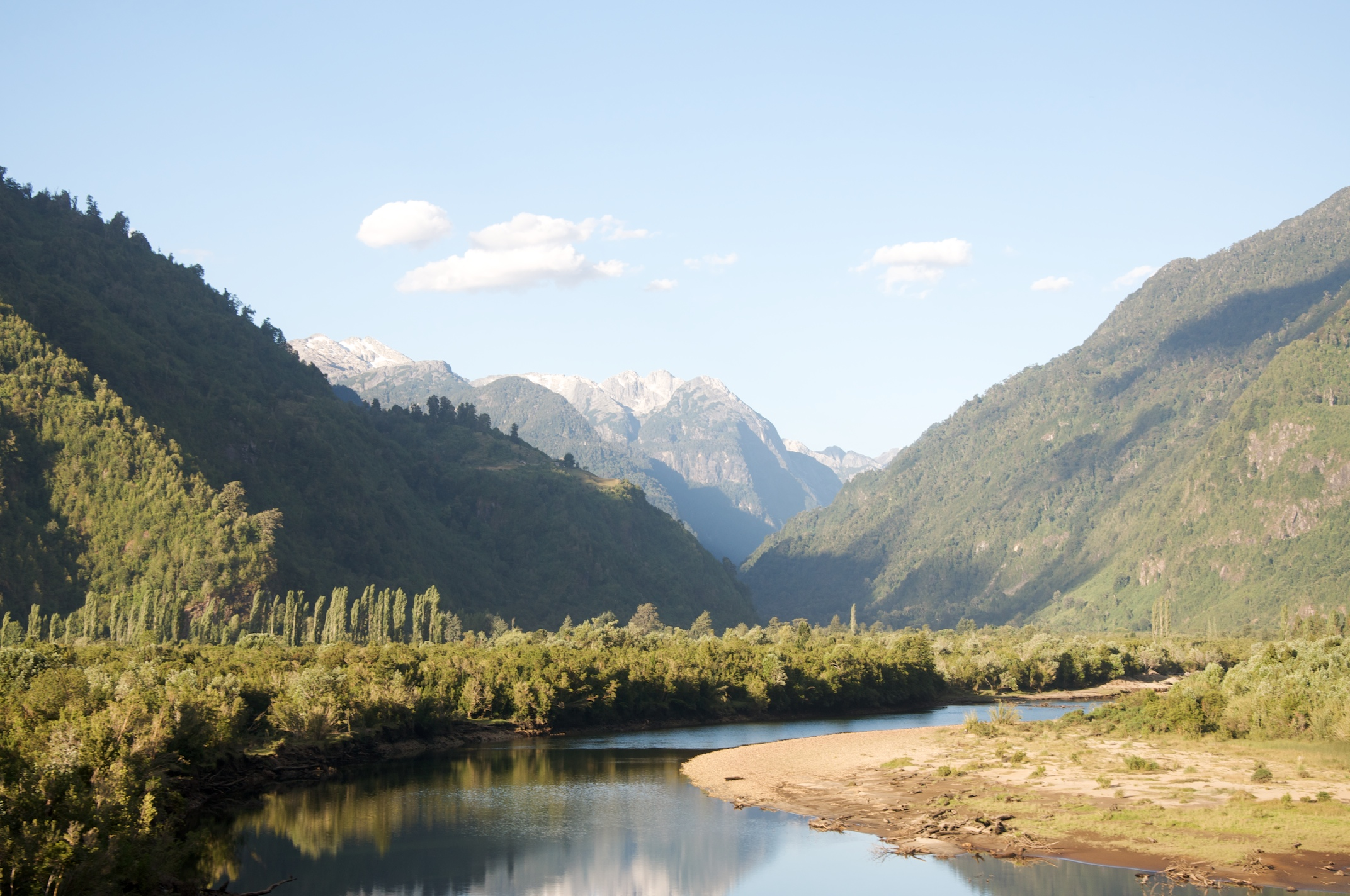 Río Cochamó